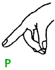 Buchstabe P im deutschen Fingeralphabet, gemäß einer Infokarte des Landesverbandes Bayern der Gehörlosen e.V. (